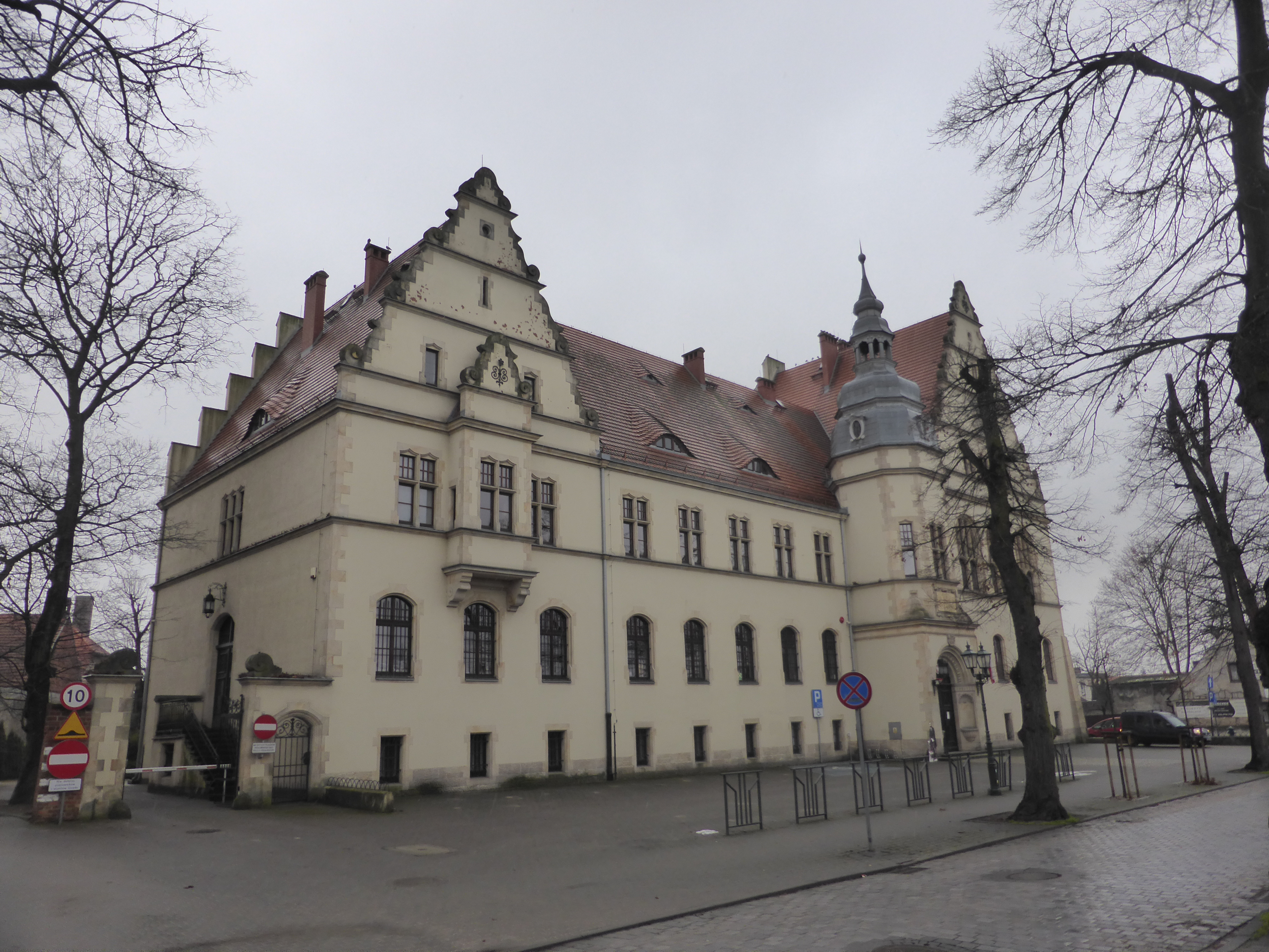 Amtsgericht in Grodzisk Wielkopolski (Poland)